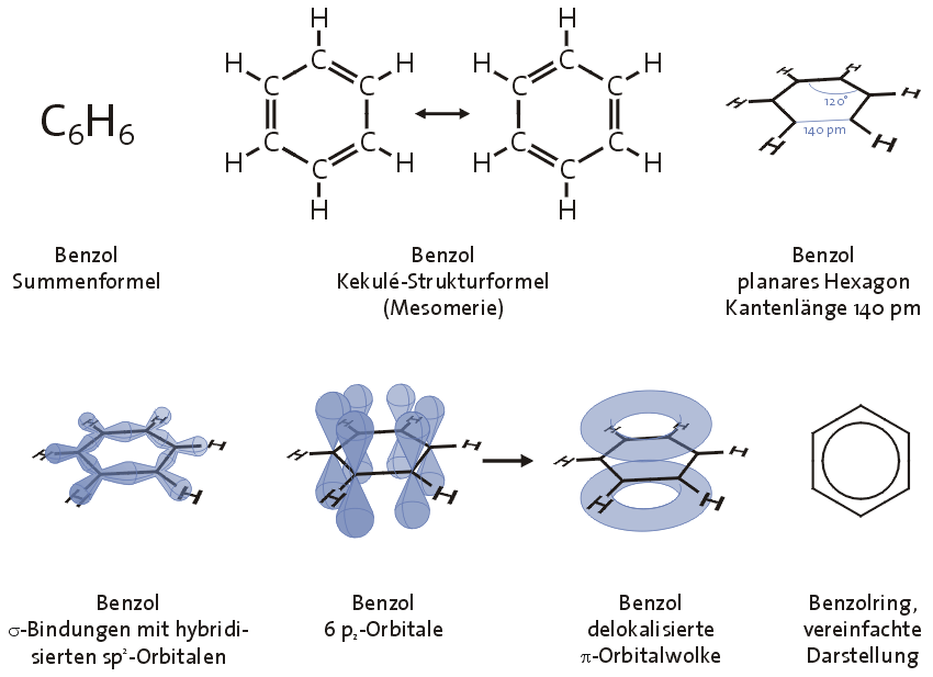 Molekülgeometrie des Benzols, verschiedene Strukturformeln, Orbitale